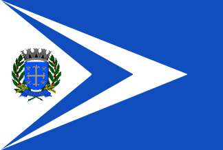 Bandeira de Poloni - SP - Brasil.